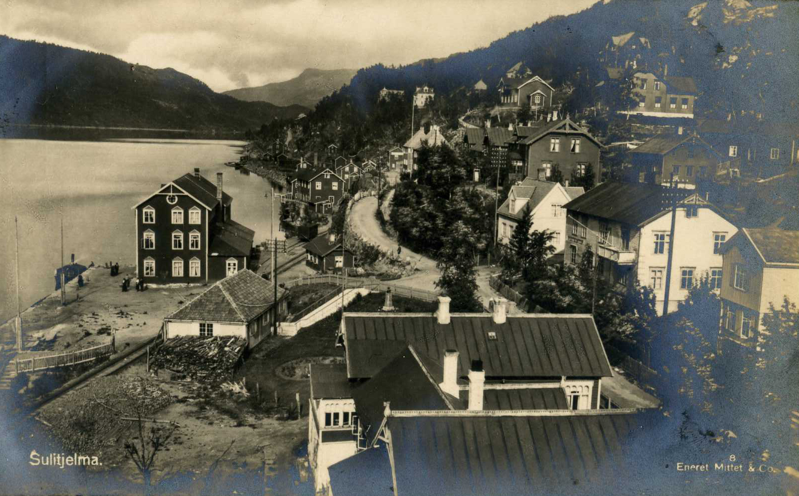 Sulitjelma